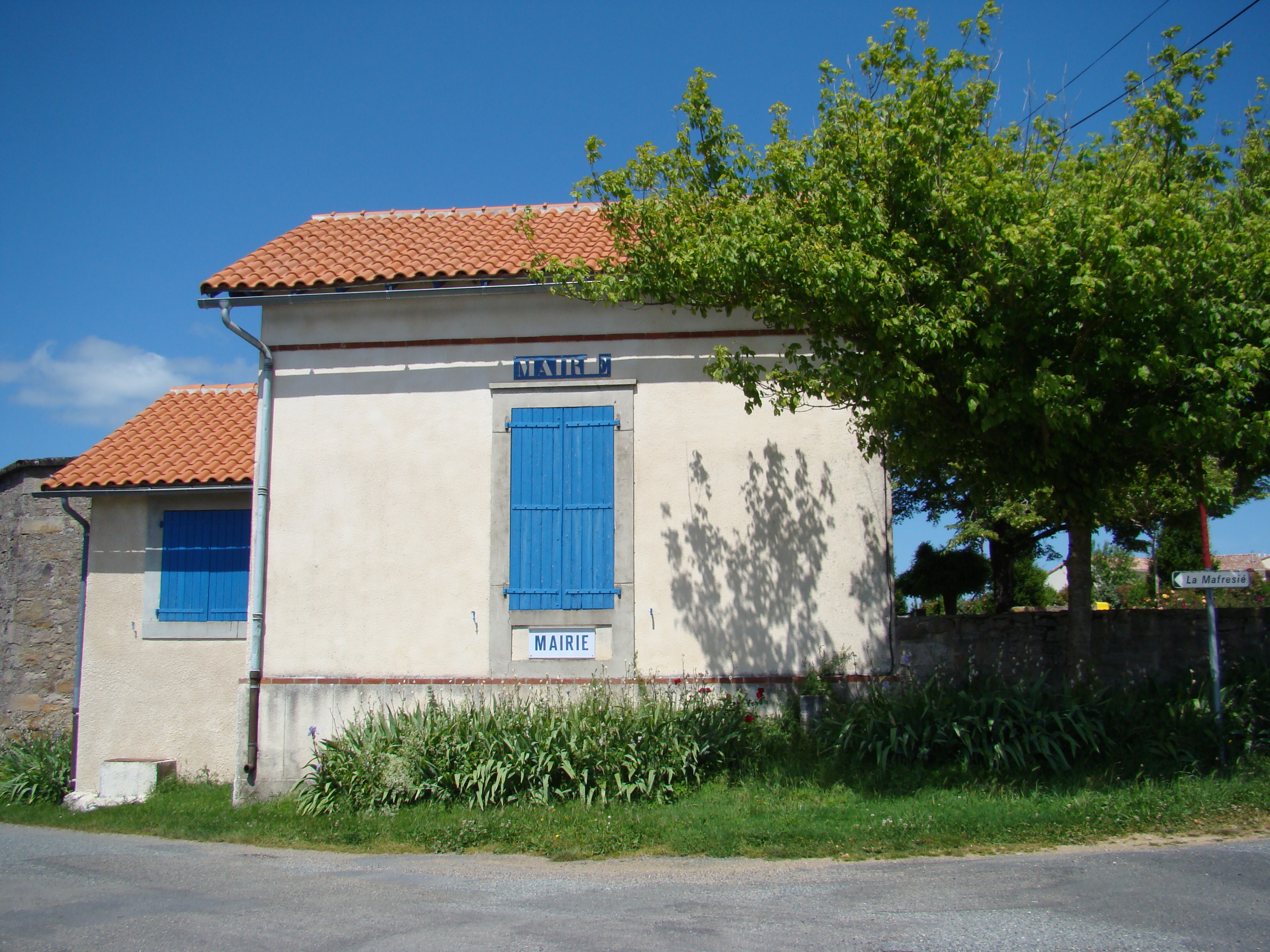 Mairie de Laparrouquial au lieu-dit "La Vaysse"